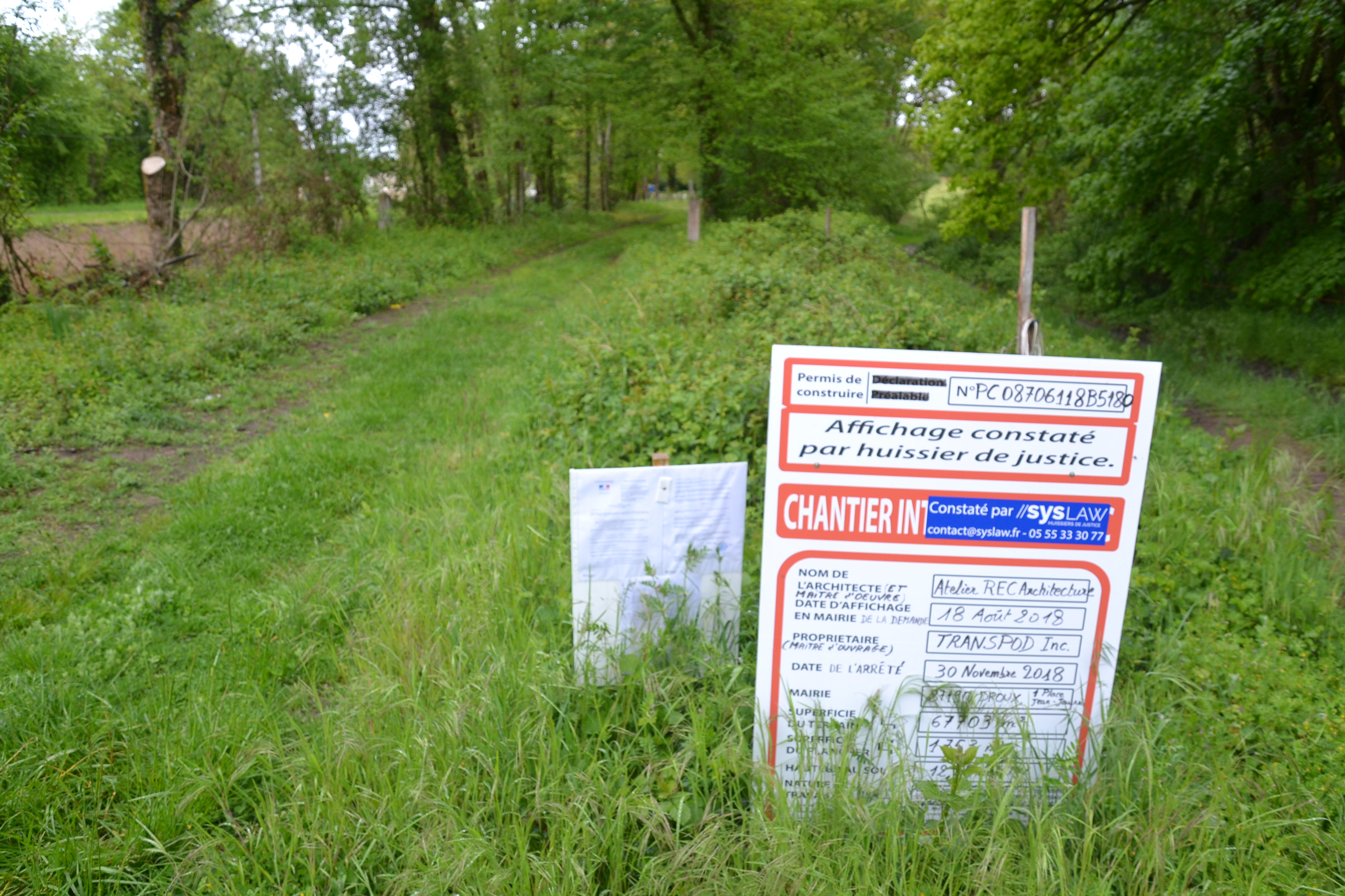 Ancienne ligne de Mignaloux - Nouaillé à Bersac, secteur de Droux (Haute-Vienne, France). Permis de construire du site expérimental Transpod (technologie Hyperloop).